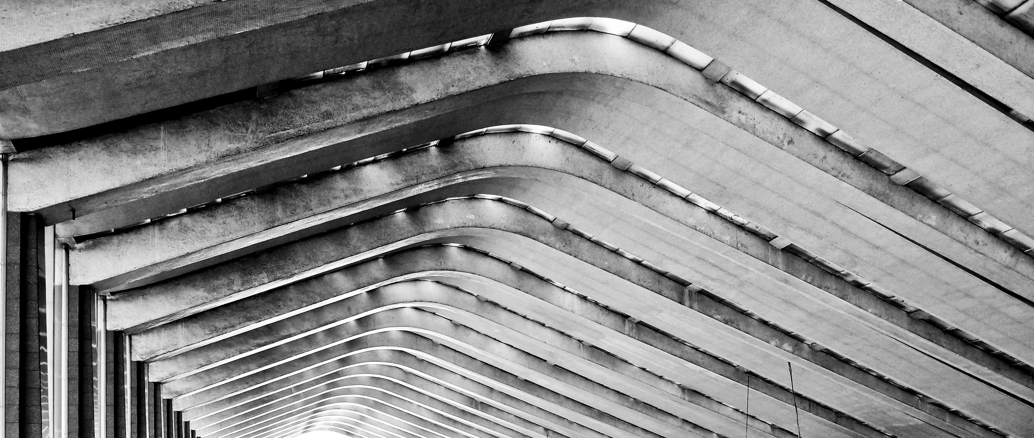 Detail der Binderkonstruktion in der Schalterhalle des Bahnhofs Termini in Rom.